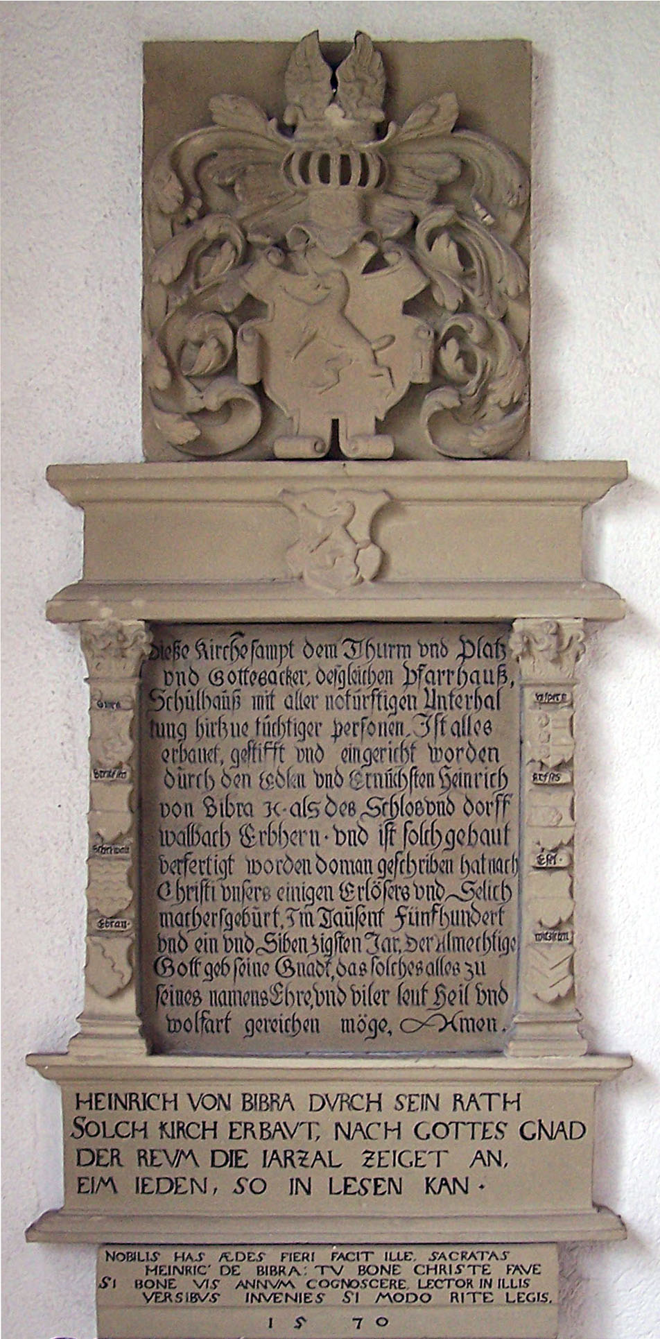 Burgwallbach Kirche